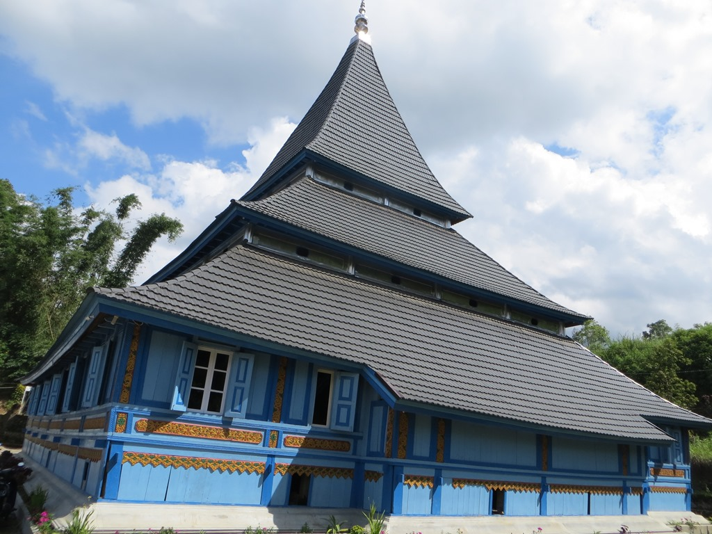 Masjid Bingkudu 2017